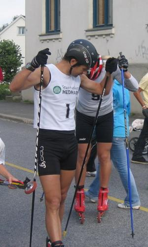 The Norwegian biathlet Ole Einar Bjørndalen under Kirkebakken Grand Prix 2007 in Hamar, Norway.